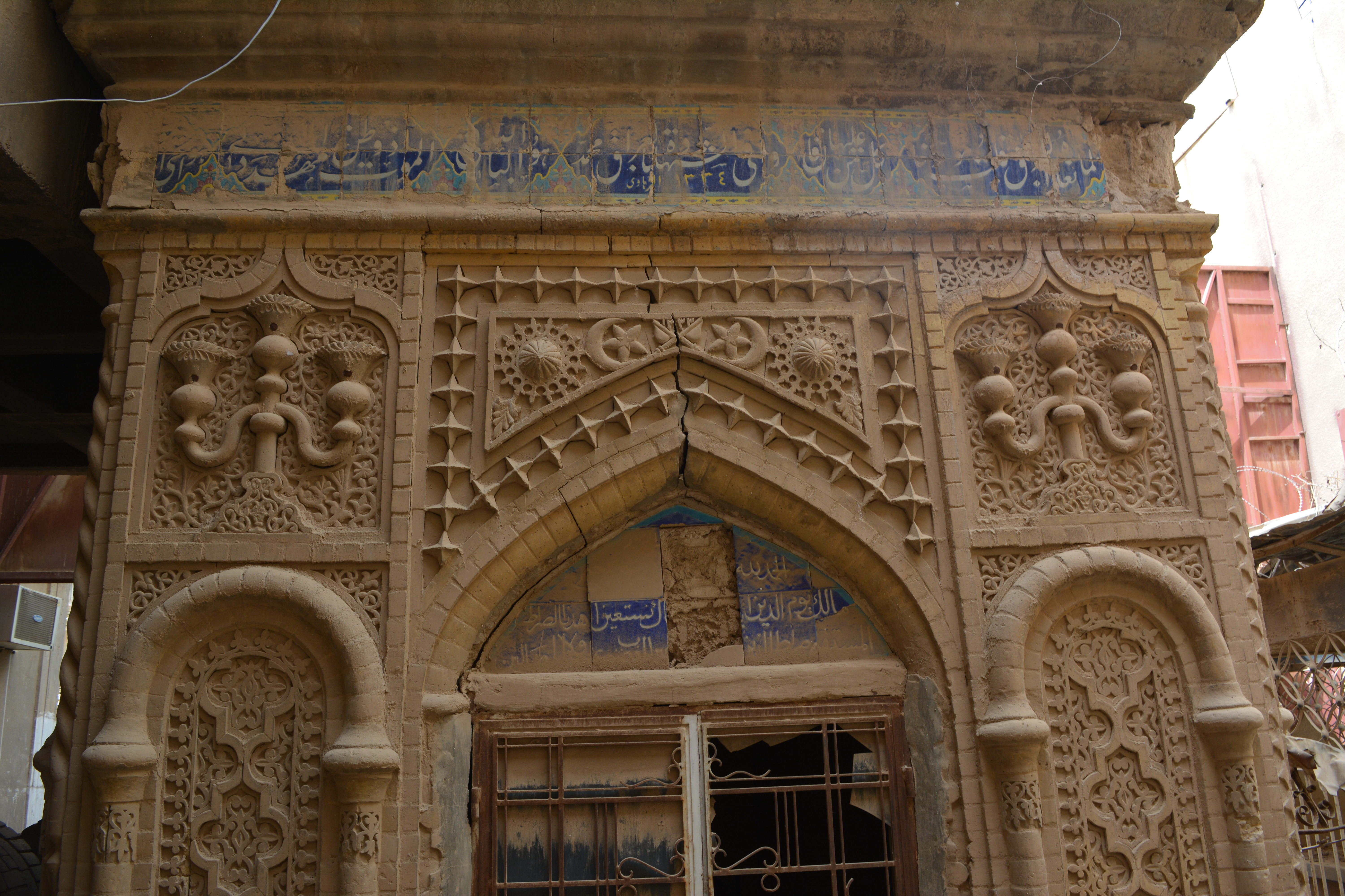 قبر محمد فاضل الداغستاني في حي الاعظمية في مقبرة الخيزران ببغداد